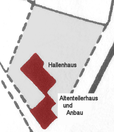 Lageplan des Köritzhof auf Basis einer Katasterkarte von 1870